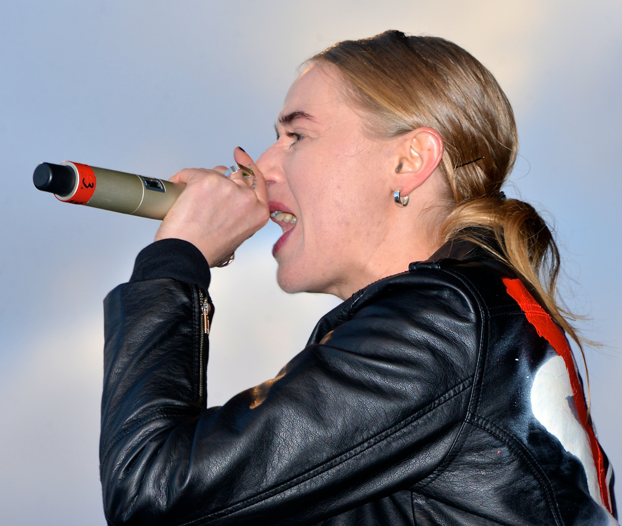 Demonstration för mångfald, mot rasism och fascism anordnad av Linje 17 i Kärrtorp 22 december 2013.